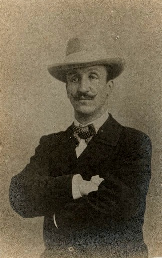 photo de Jules Guérin